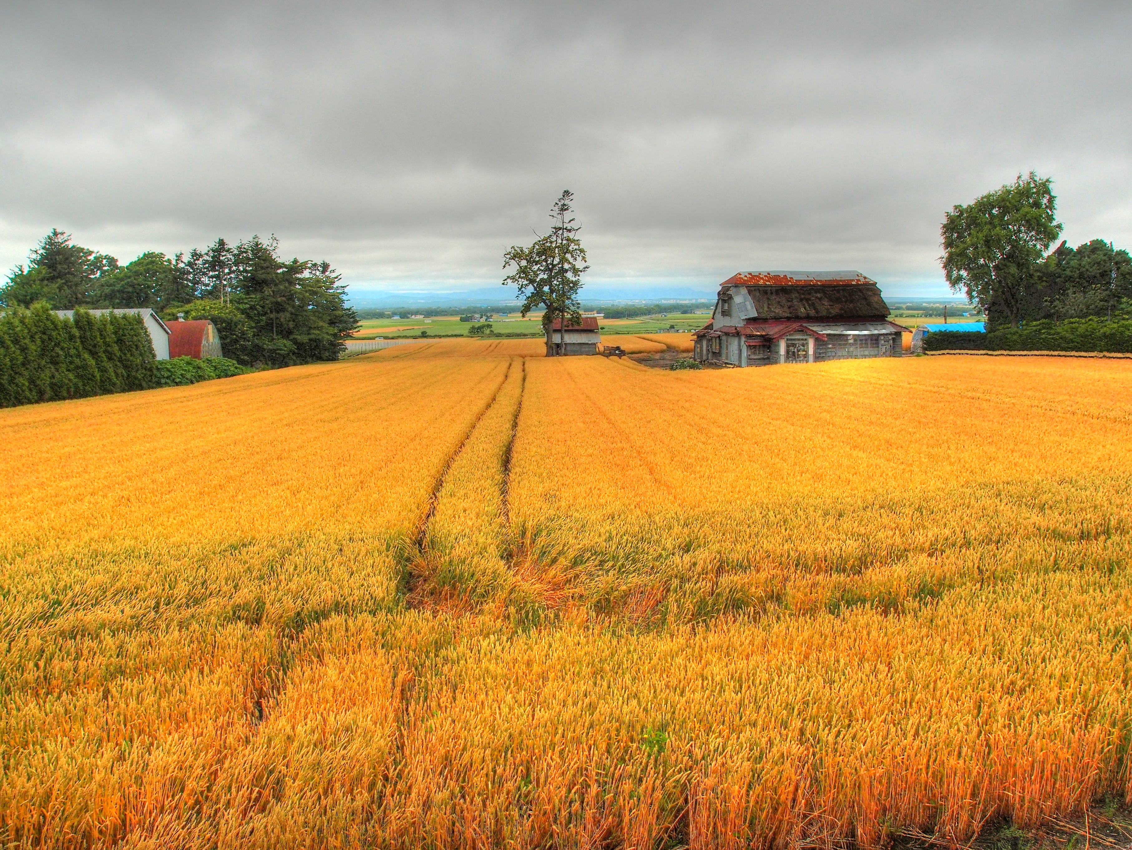 Rute337